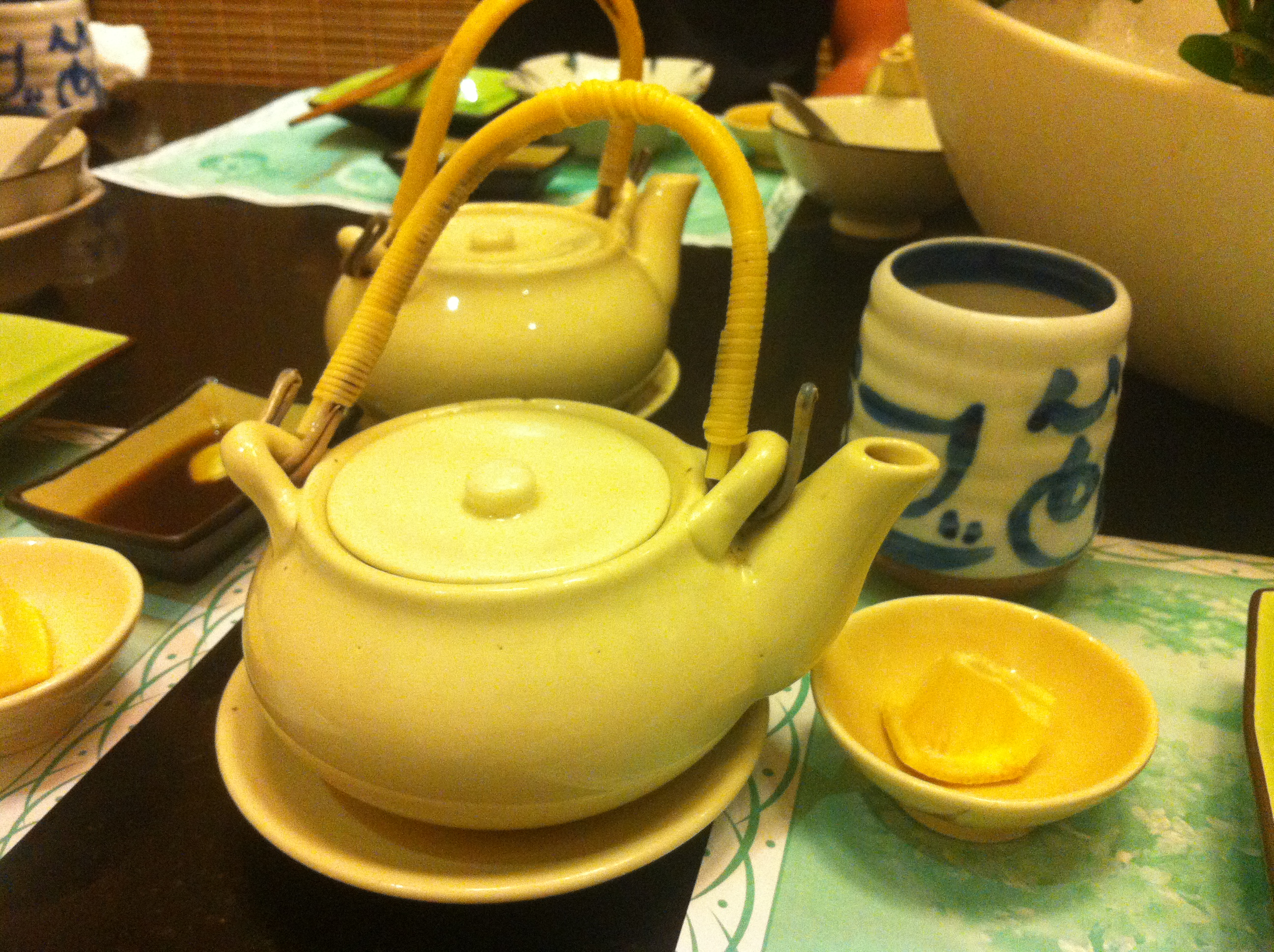 土瓶蒸し。